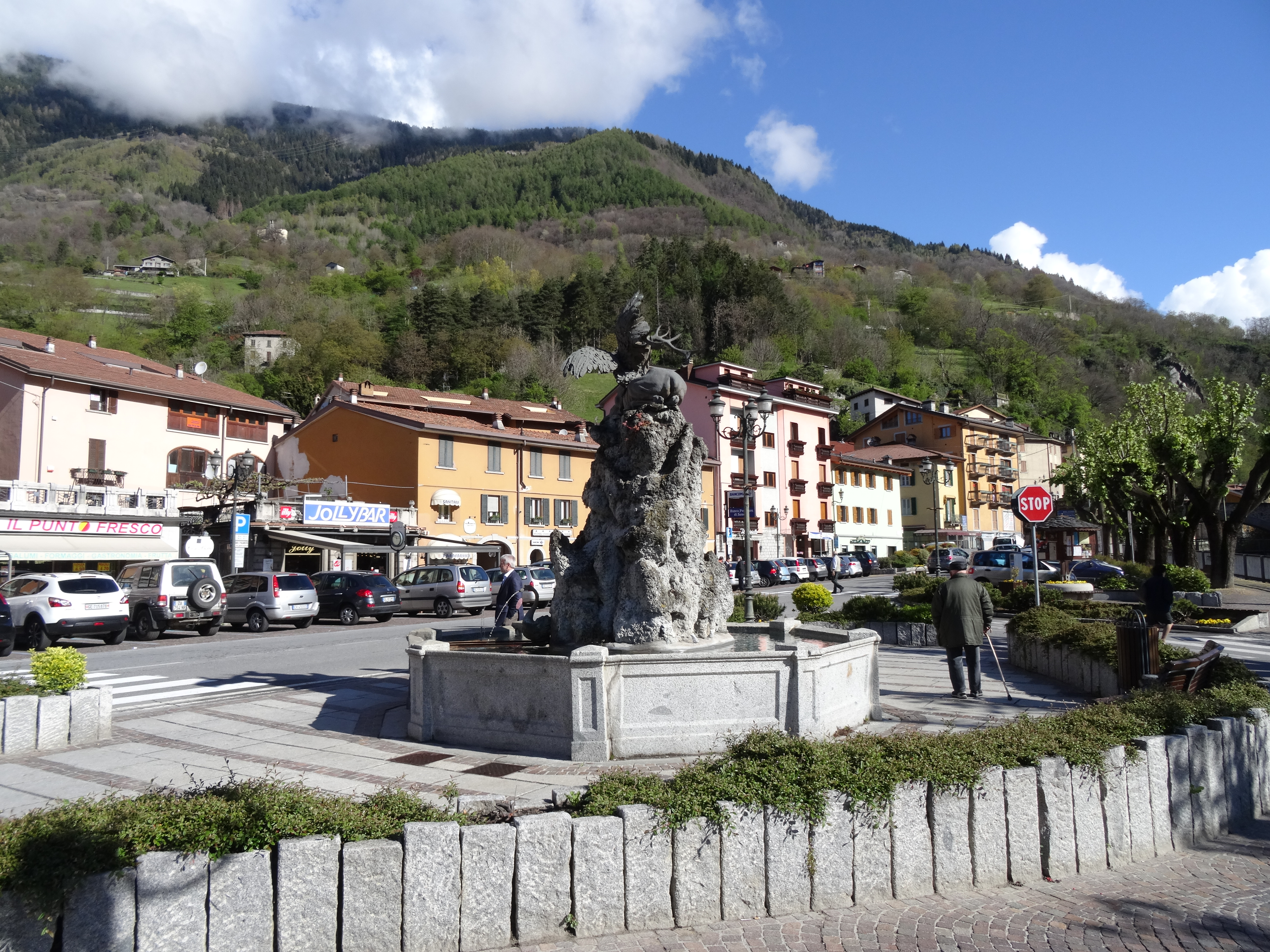 Edolo